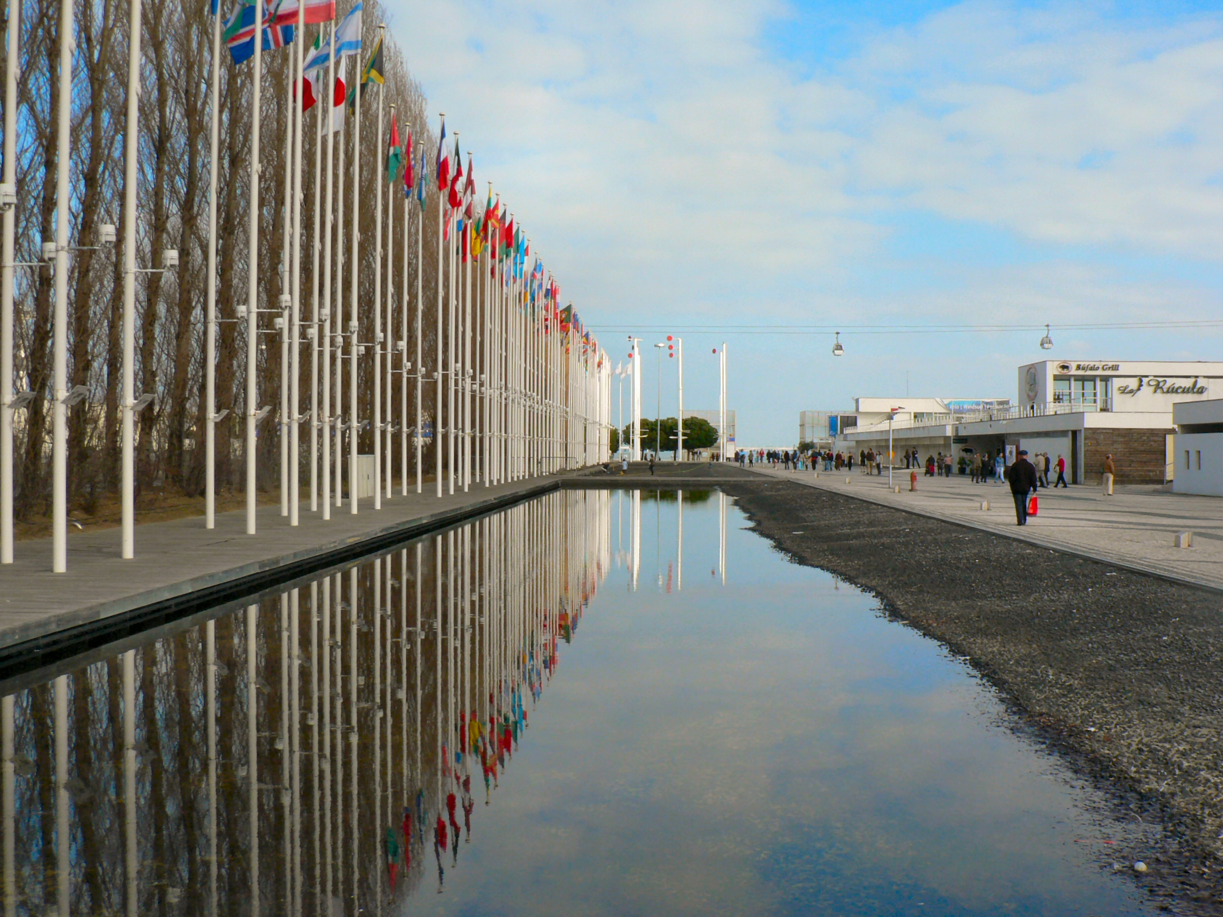 Bandeiras de todso os países que participaram na Expo 98 junto ao Pavilhão Atlântico no Parque das Nações em Lisboa